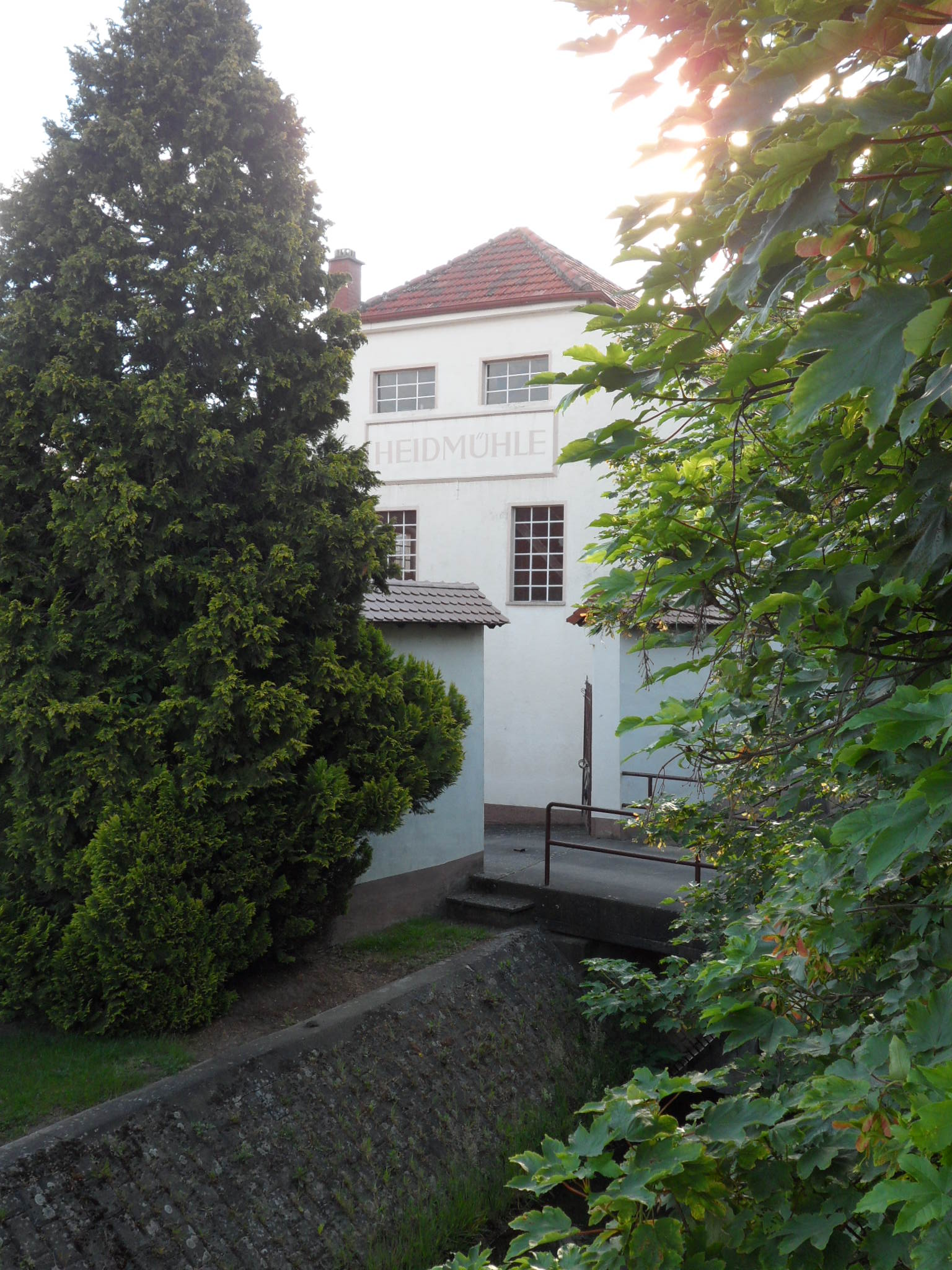 Haidmühle, Neustadt/Wstr.